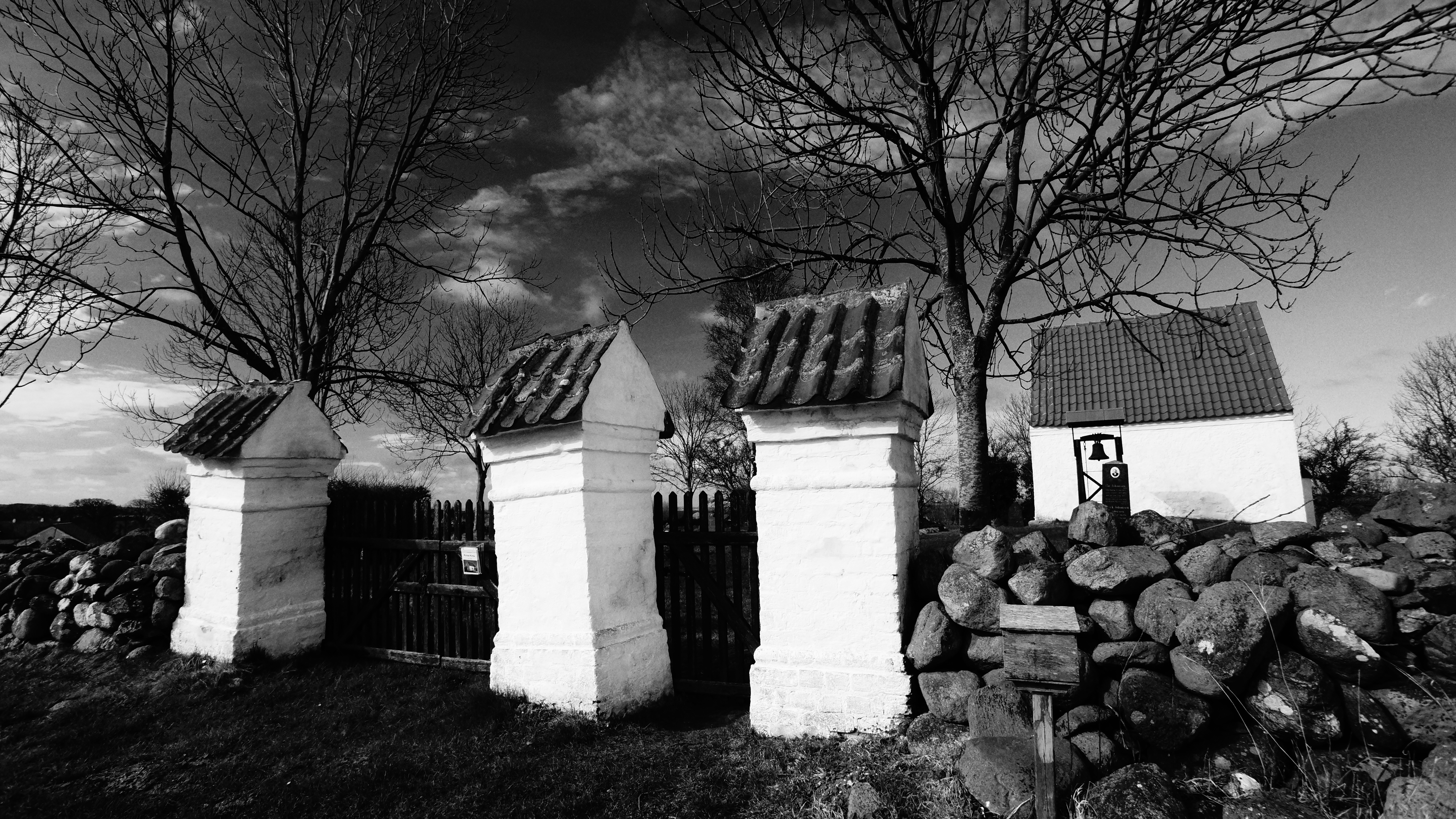 Rolsø Kapel, Indgangsparti